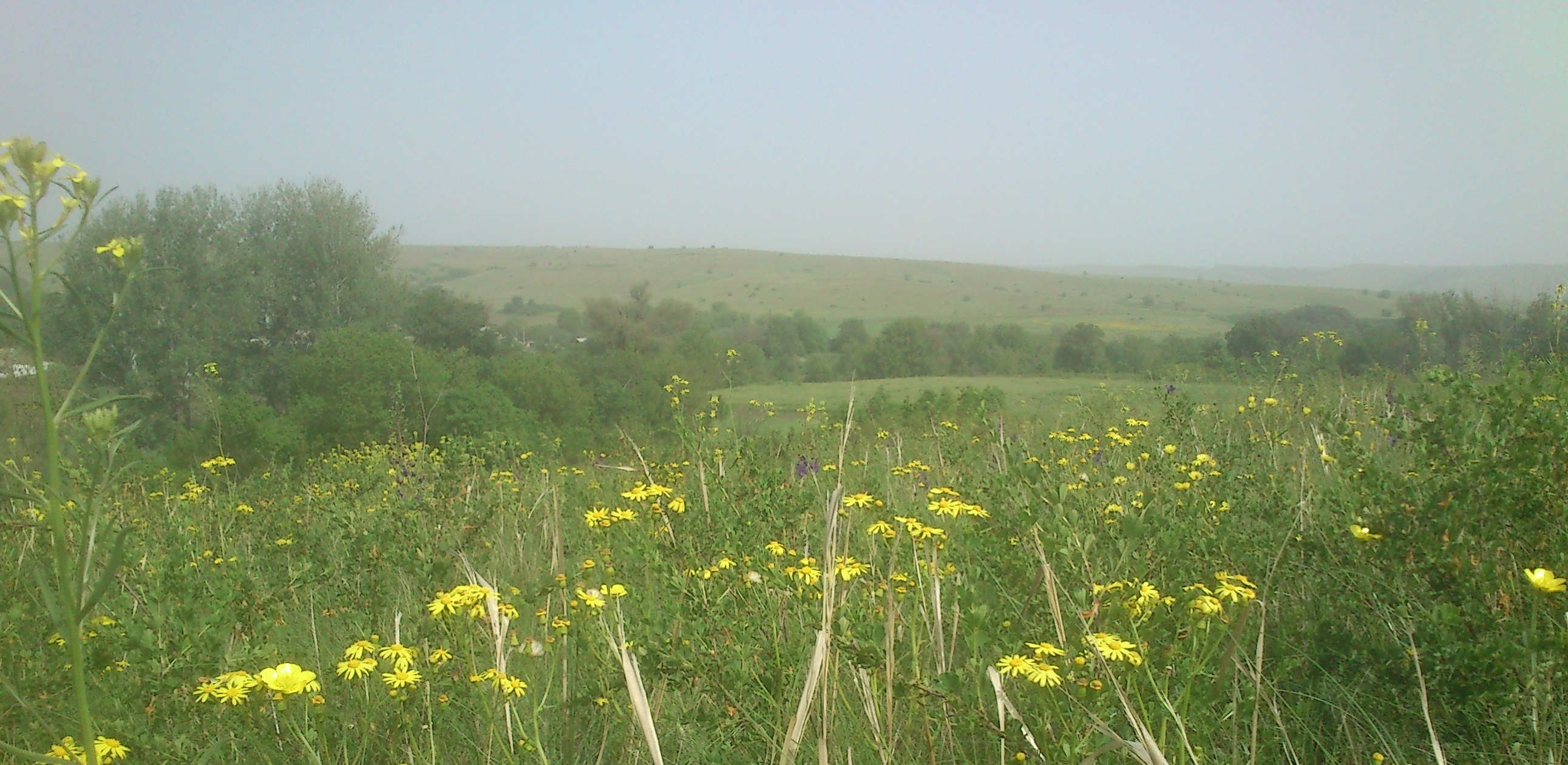 Окрестности поселения родовых поместий Дружное